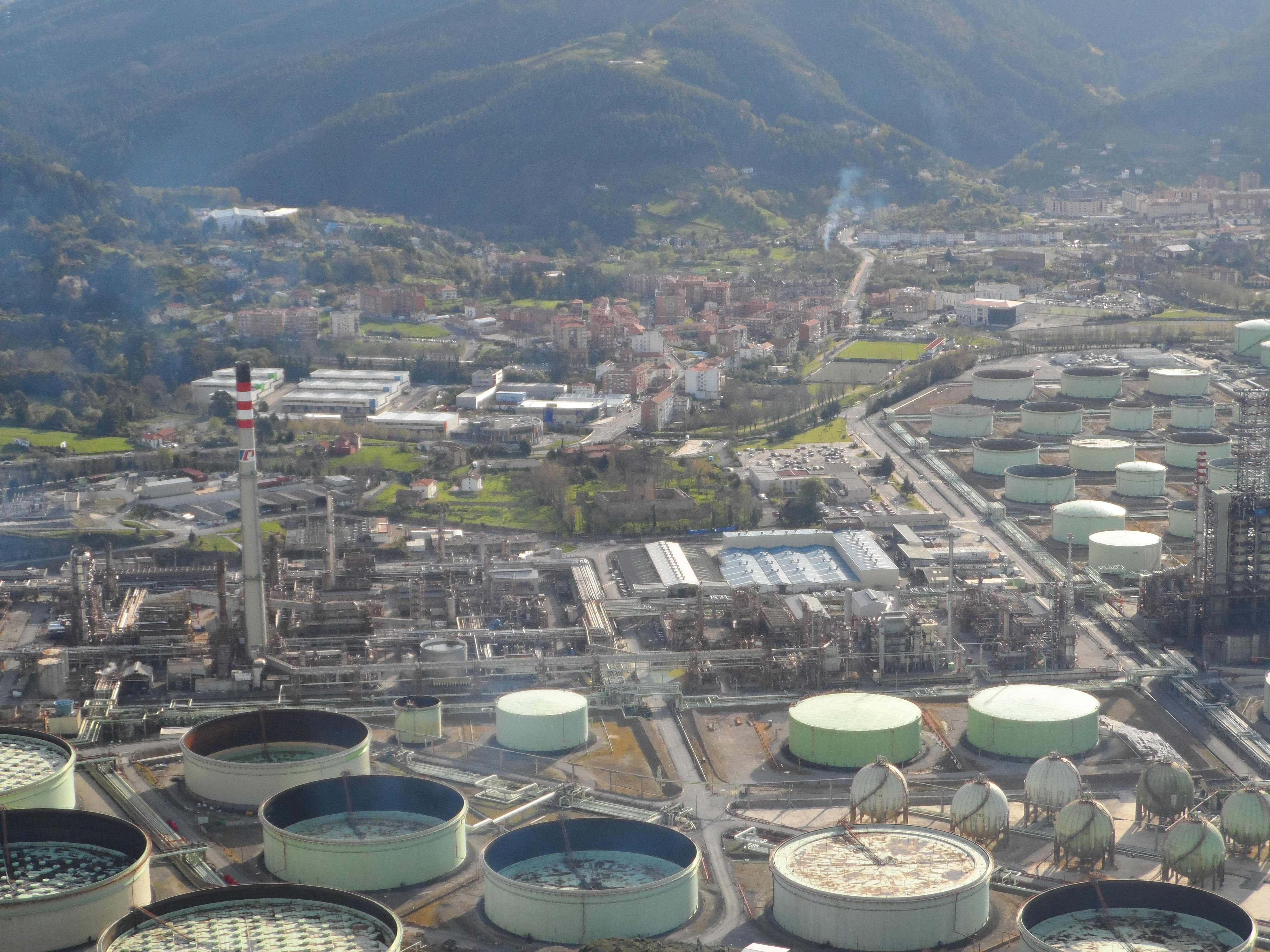 Muskiz (Bizkaia), Montañotik ikusita.